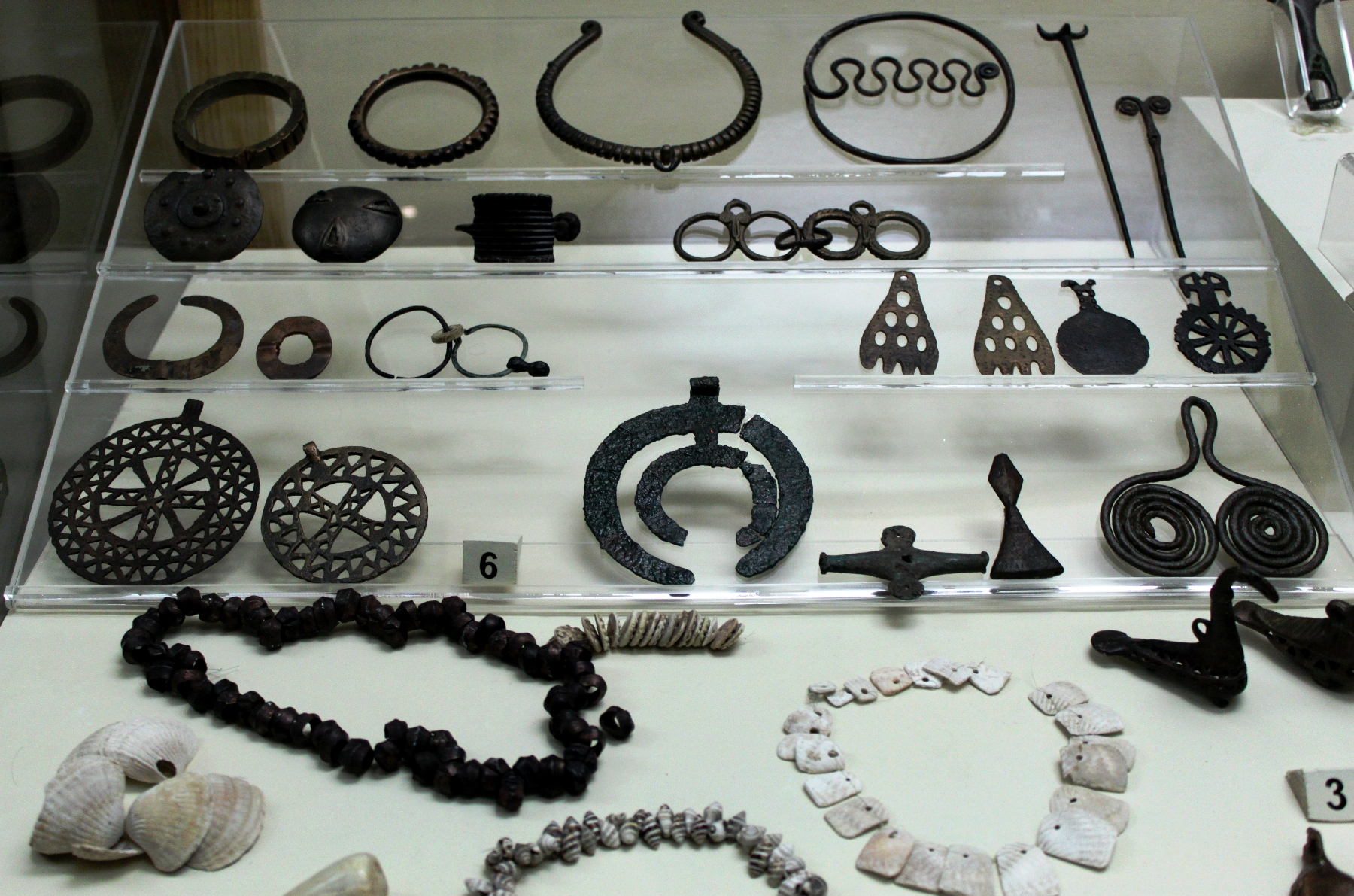 Медные украшения